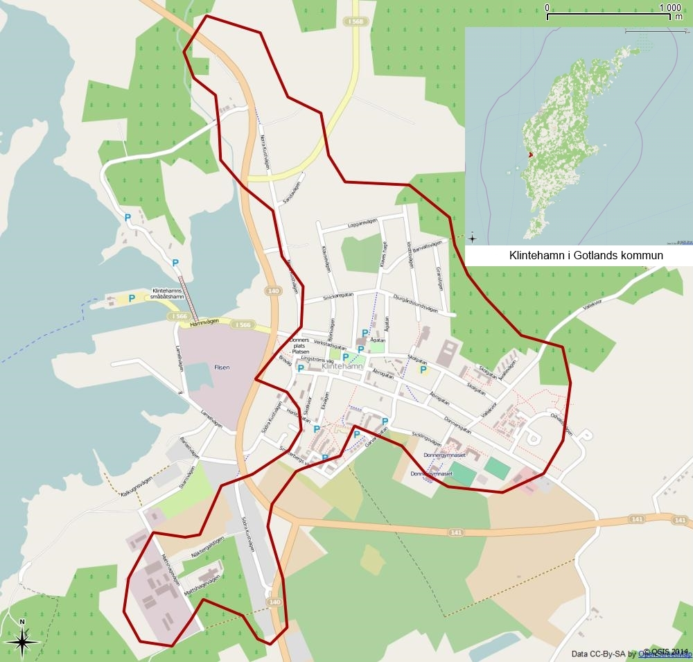 Tätorten Klintehamn gränser 1990 enligt Atlas över rikets indelningar 1992.